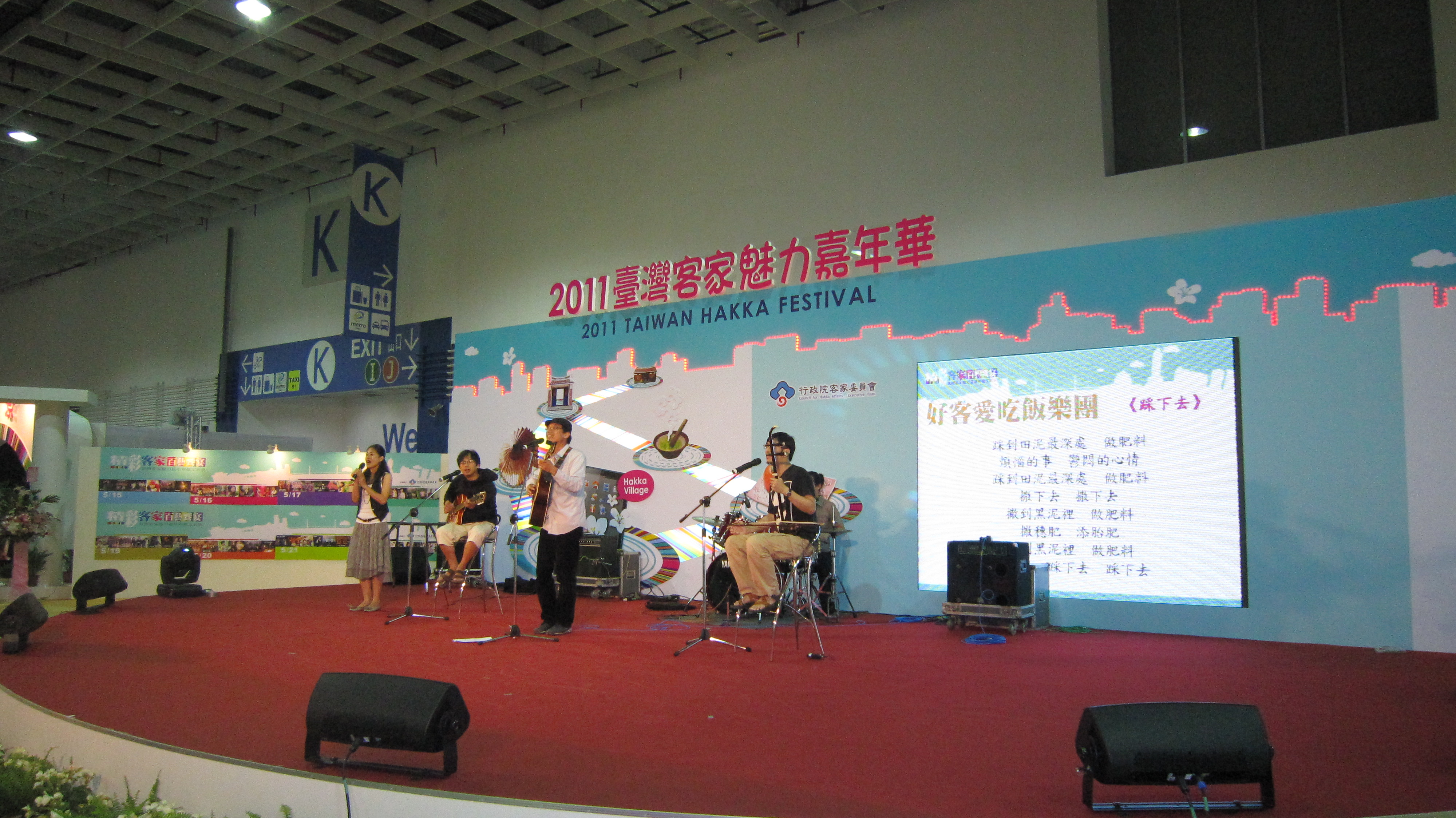 100年5月20日臺灣客家魅力嘉年華在台北世貿南港展覽館 展出現場拍攝有最道地的客家美食最精采的客家文化最豐富的客家傳統最精美的客家商品